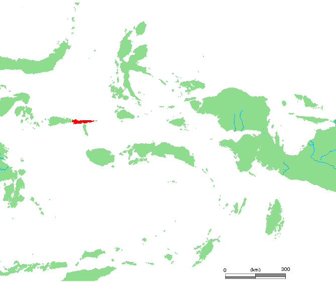 ID Mangole.PNG